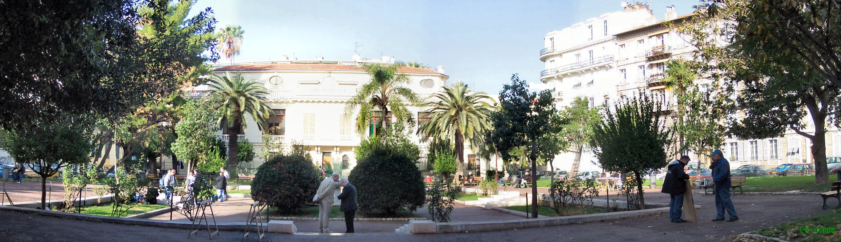 Le square Dominique-Durandy, anciens jardins de la villa Rambourg devenu bibliothèque municipale en 1927.